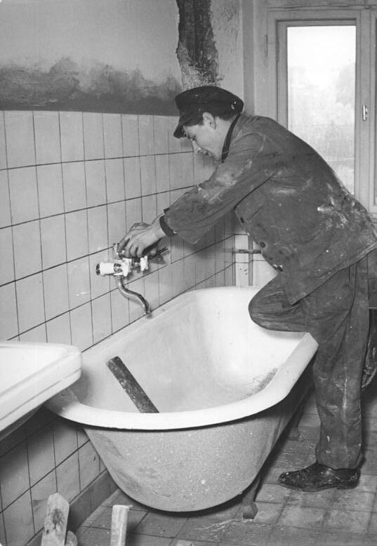 Zentralbild Klein 14.11.1952 Nur im Frieden kann unser Handwerk gedeihen-Die Klempner, Installateure und Heizungsbauer aller Handwerksbetriebe, die an den Bauten der ersten sozialistischen Strasse in Berlin arbeiten, sind in einer Genossenschaft organisiert. Die Handwerker wissen, dass die Genossenschaft auch den kleinsten Handwerksbetrieb die Möglichkeit bietet, die ihm gestellten Aufgaben im Vokswirtschaftsplan zu lösen und seine Produktivkräfte zu entwickeln. Im III.Quartal 1952 hat das genossenschaftliche Handwerk im demokratischen Sektor einen Umsatz von 37 Millionen DM erreicht, ein Beweis für die Fortschritte, die das Berliner Handwerk durch die Arbeit der Genossenschaftren erzielt hat. UBz: Der Rohrleger Altstedt montiert die Brausebatterie in einem bereits installierten Bad einer Wohnung im Block Südost am Strausberger Platz.